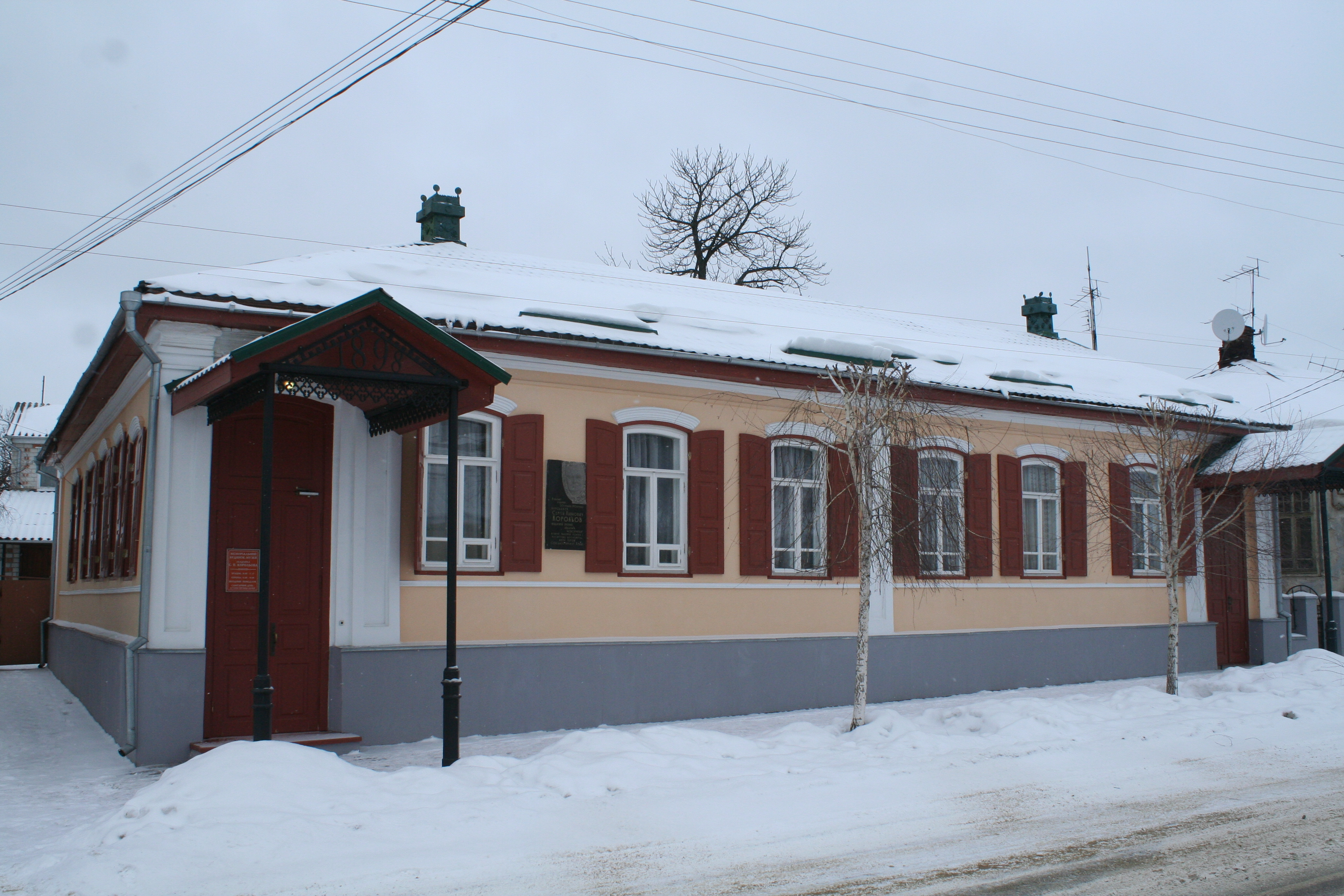 Житомир, вул. Дмитрівська, 5, Житловий будинок, зовнішний вигляд, головний фасад по червоній лінії